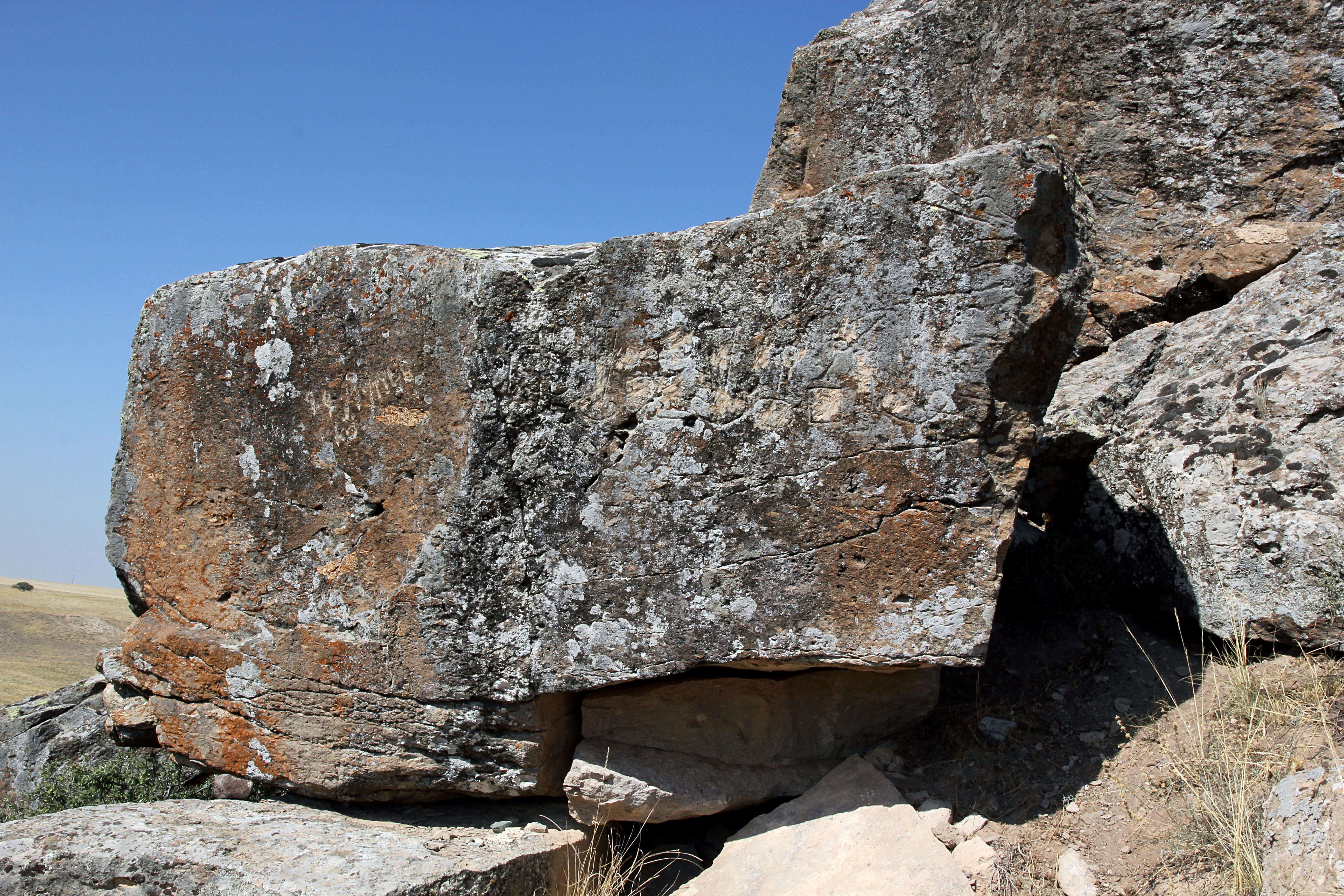 späthethitische Felsinschrift von Burunkaya bei Aksaray, Zentraltürkei